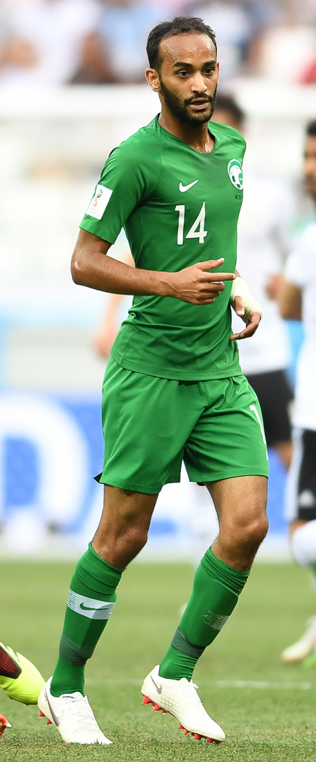 Египет с Салахом проиграл Саудовской Аравии